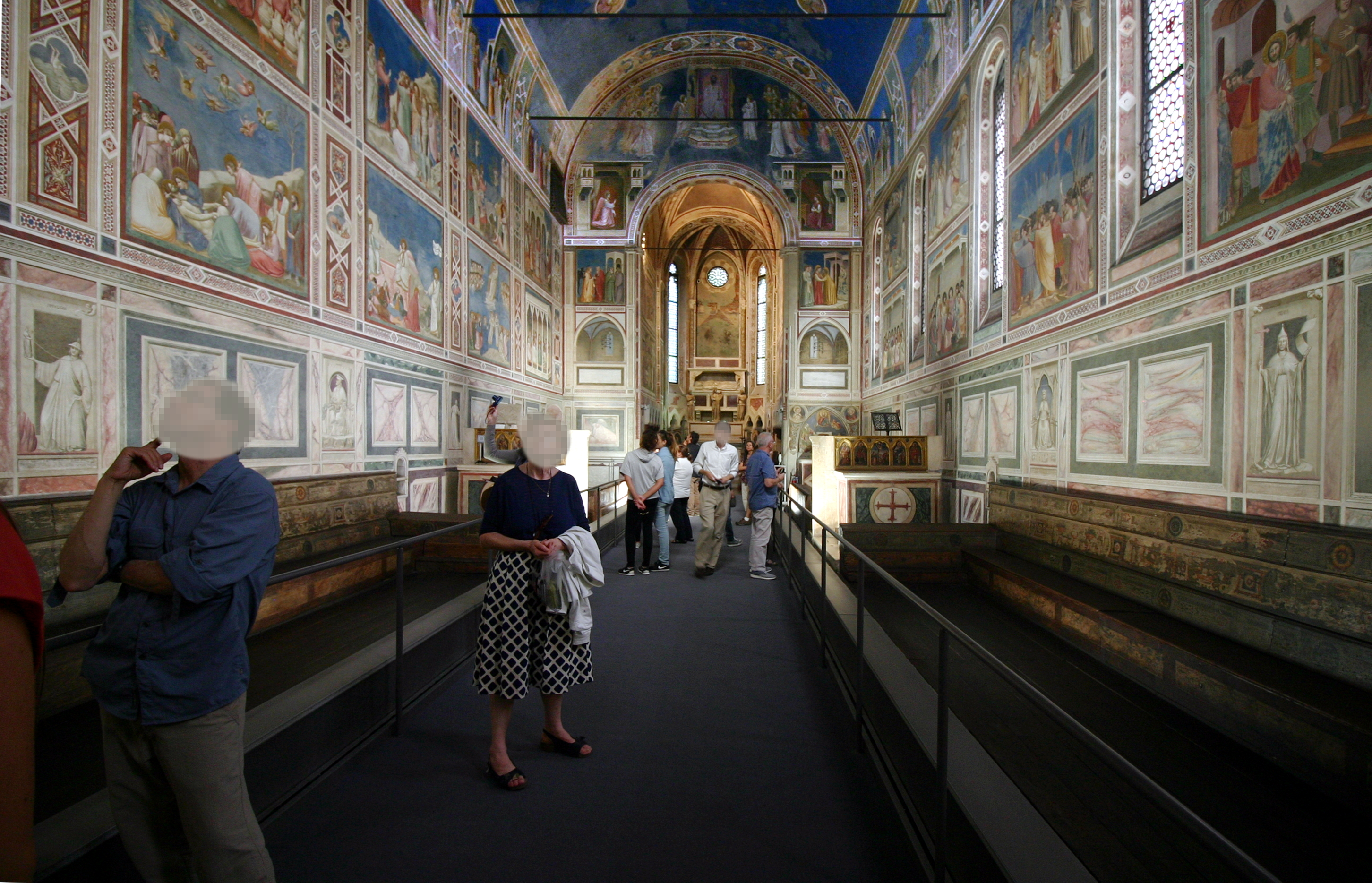 Capella degli Scrovegni - Padua